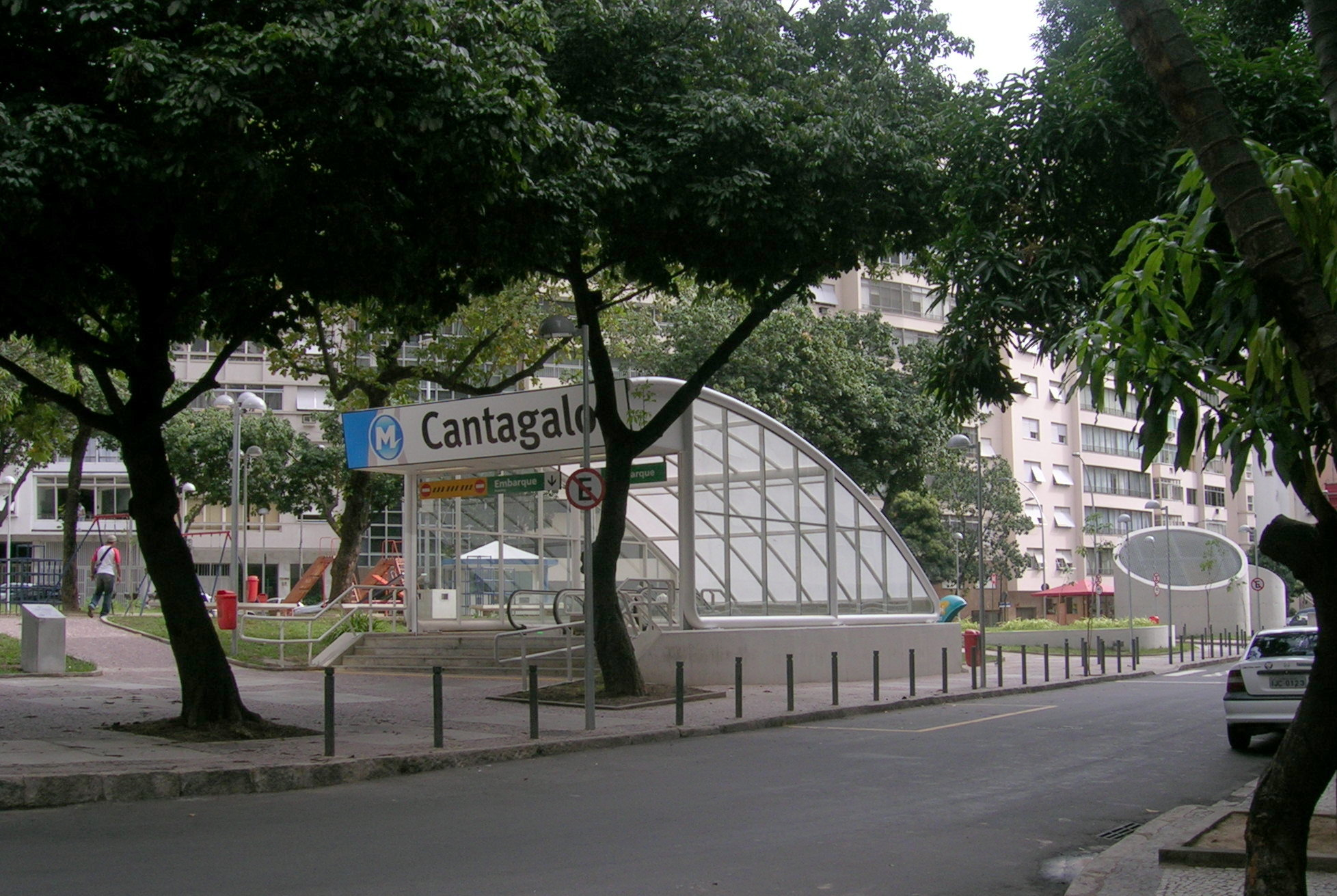 Metro station Cantagalo in Rio de Janeiro